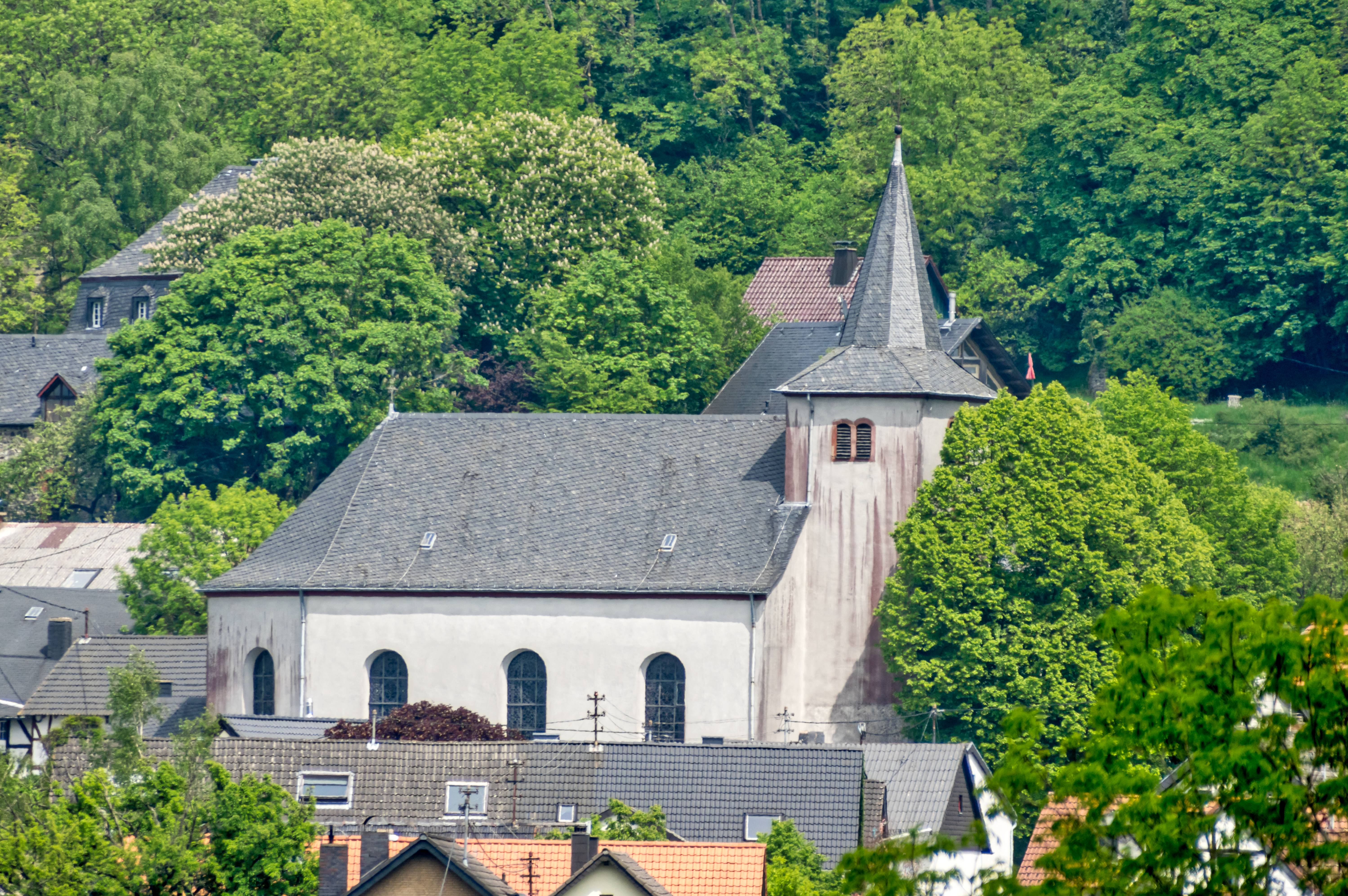 Bilder von der Kirche St Nikolaus in Aremberg Blick vom Fußballplatz des Schullandheimes auf die Kirche